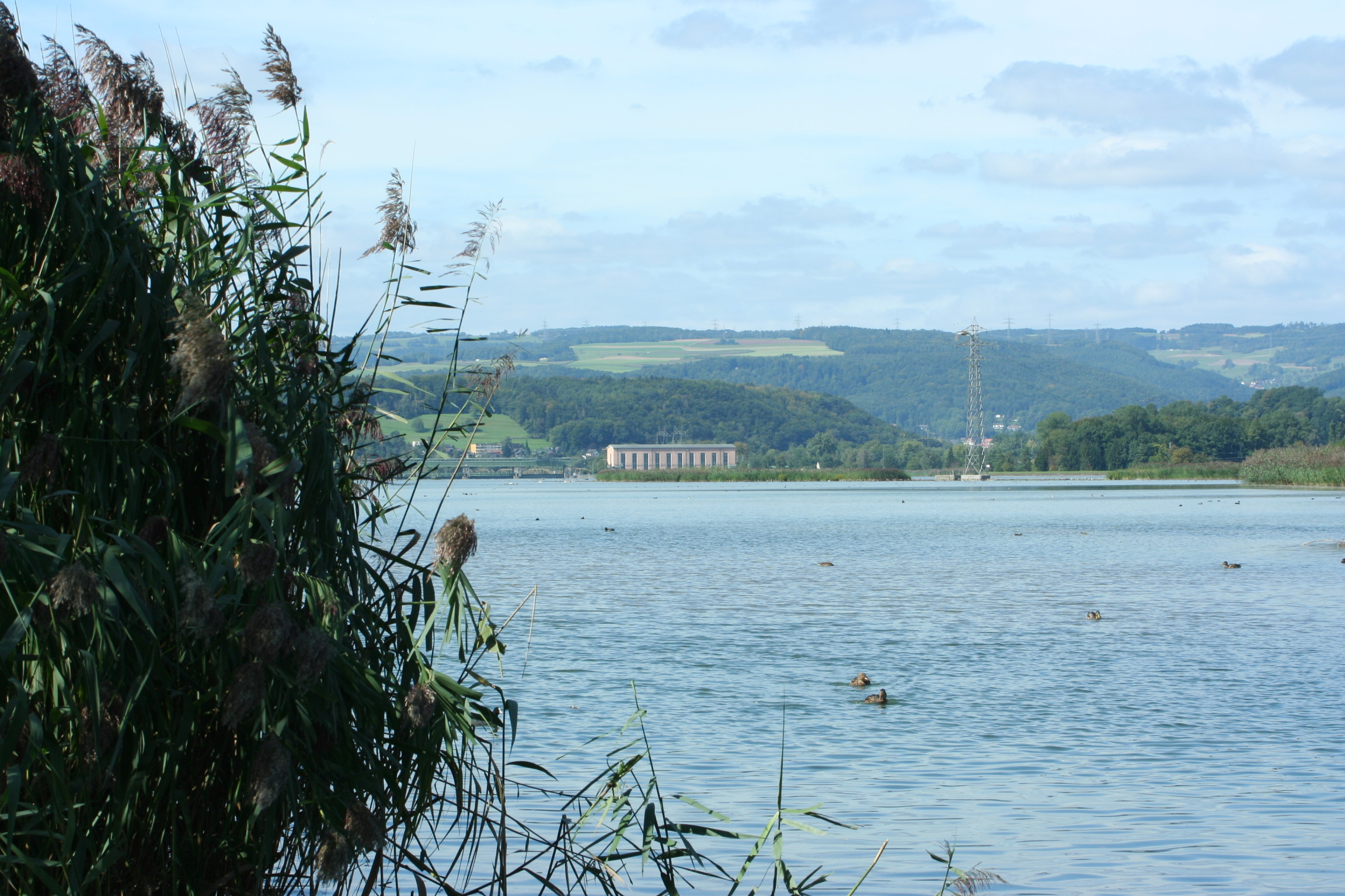 Wasserkraftwerk Klingnau von Kleindöttingen ausgesehen